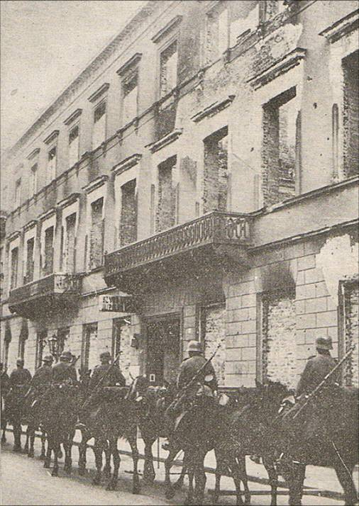 Zdjęcie zbombardowanej kamienicy przy ul. Wareckiej 7, gdzie mieściła się siedziba "Robotnika" zrobione w 1940 r. i dostarczone przez PPS do Londynu